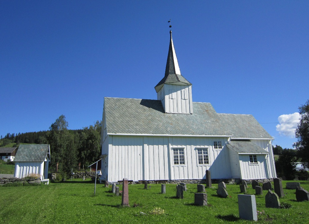 Volbu kirke, Øystre Slidre